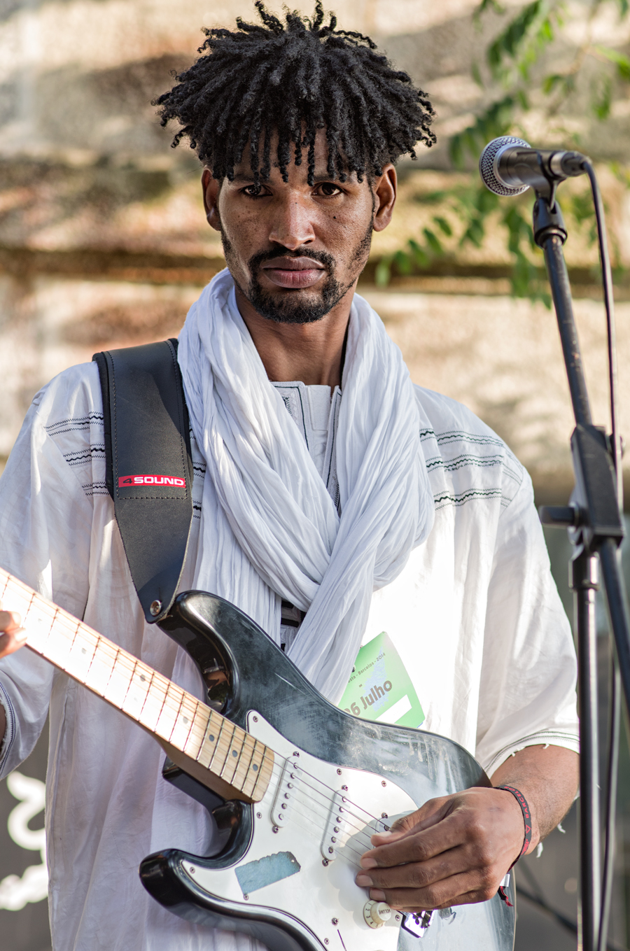 Pentax K5 + Pentax FA 77mm F1,8 limited -Festival SinSal San Simón